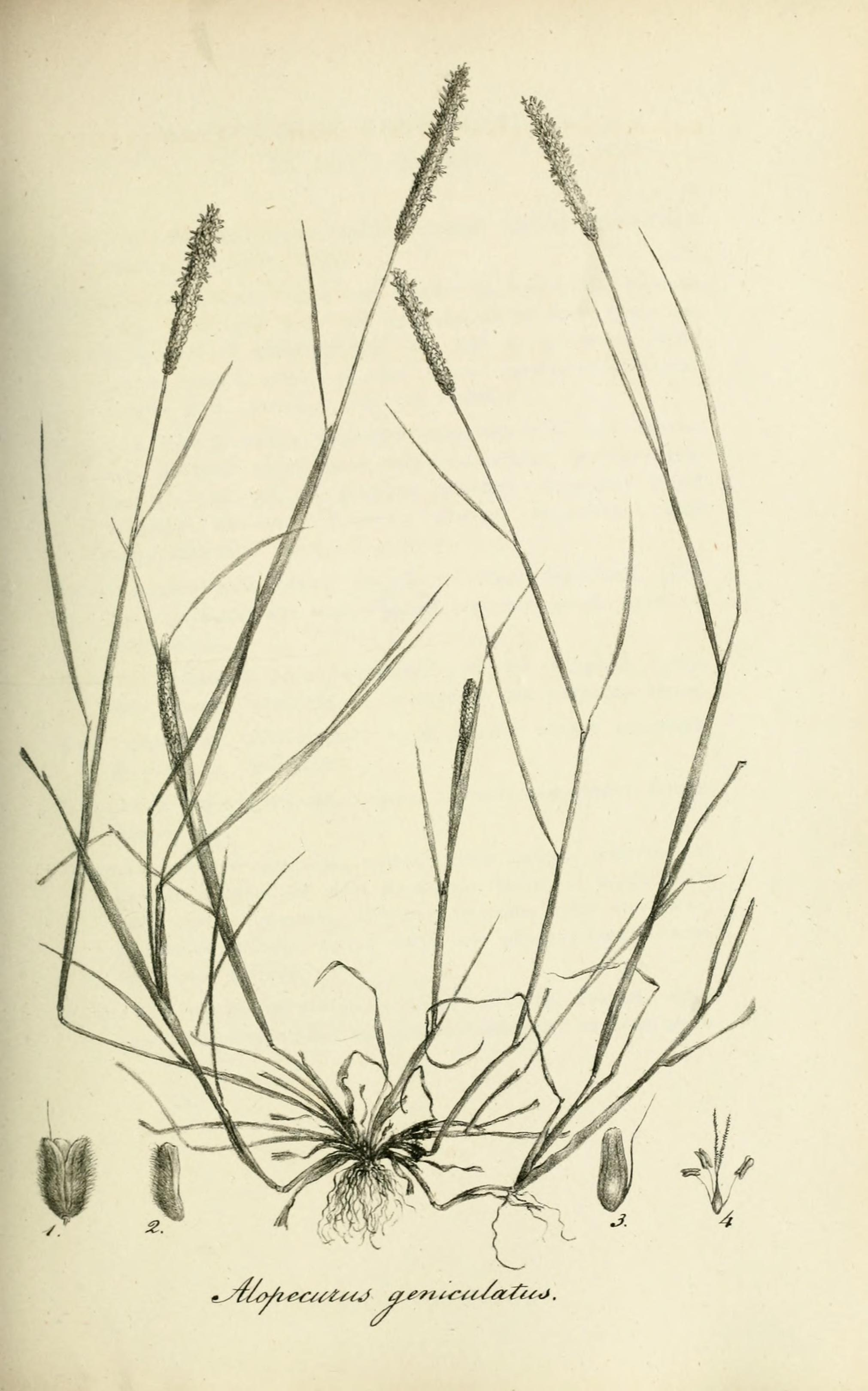 Alopecurus geniculatus L.